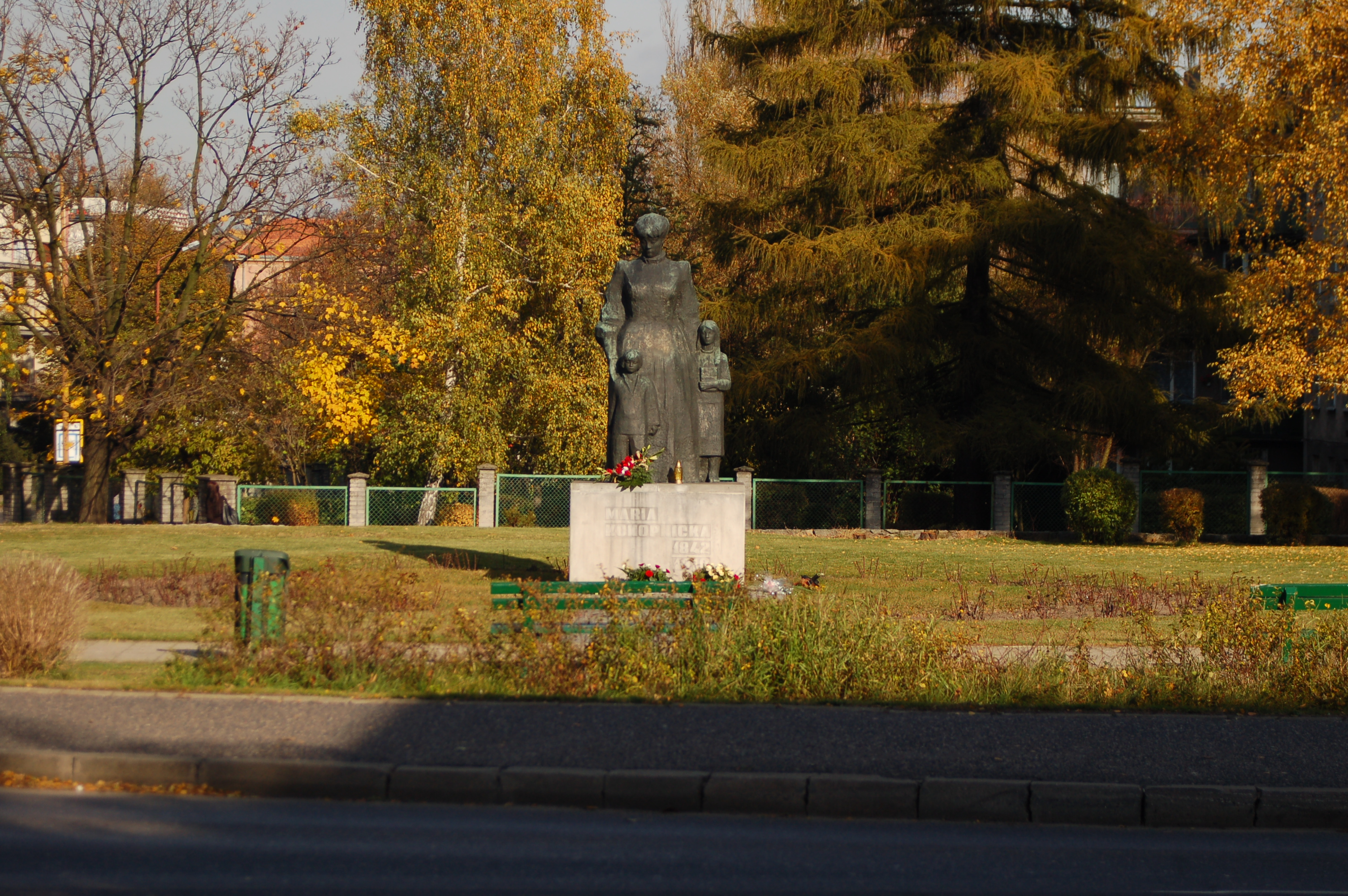 Pomnik Marii Konpnickiej.